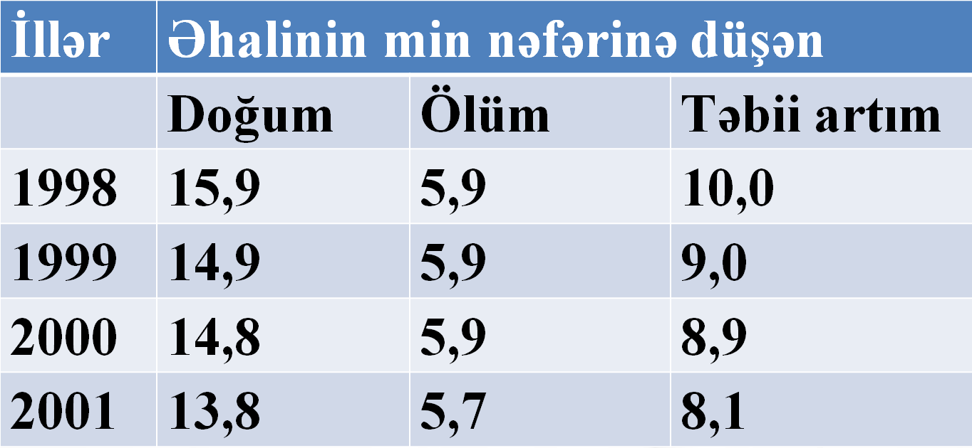 İntensivlik nisbi kəmiyyəti